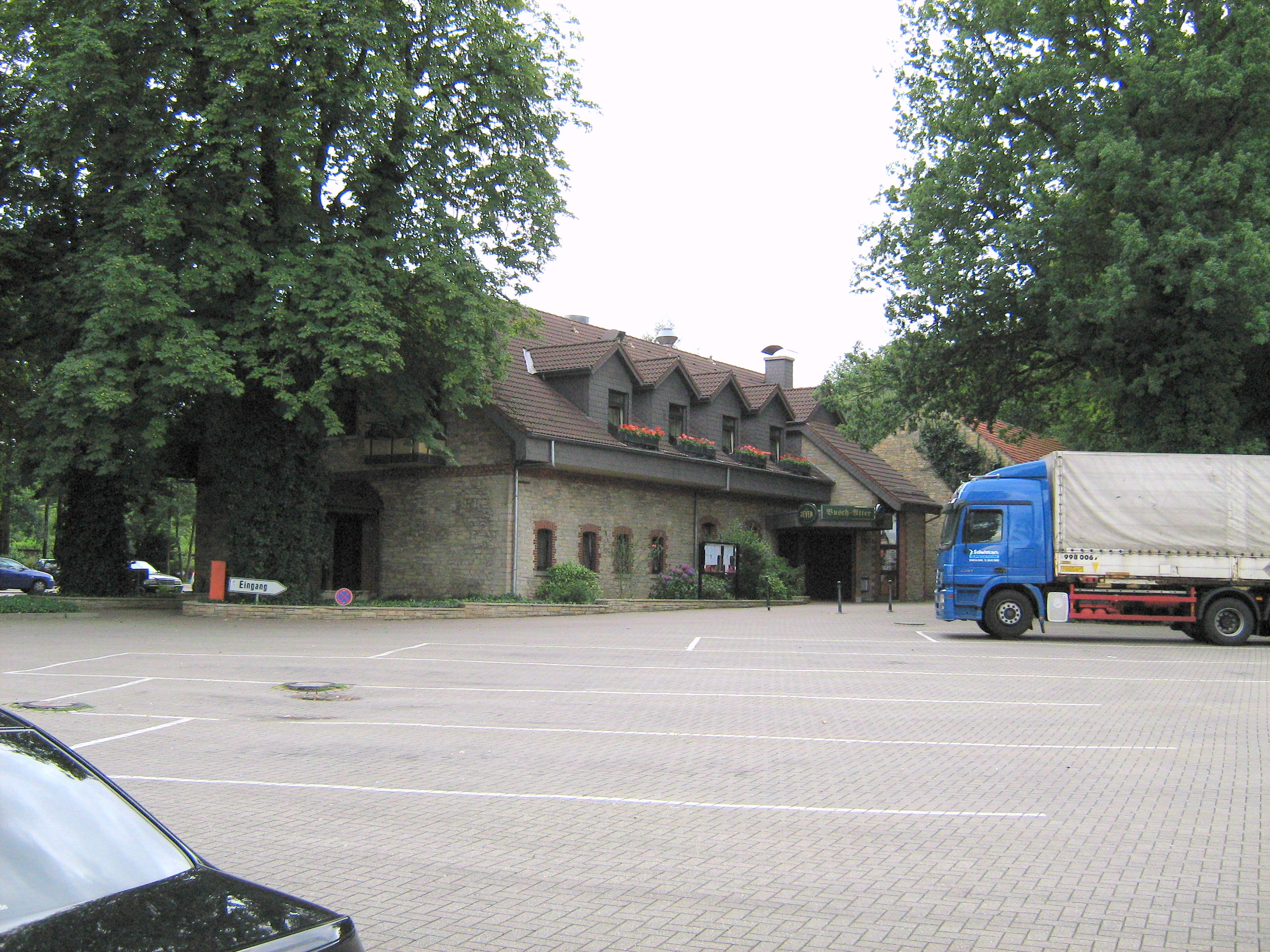 Autohof Osnarück (BAB A1 -Abfahrt: Osnabrück-Atter)